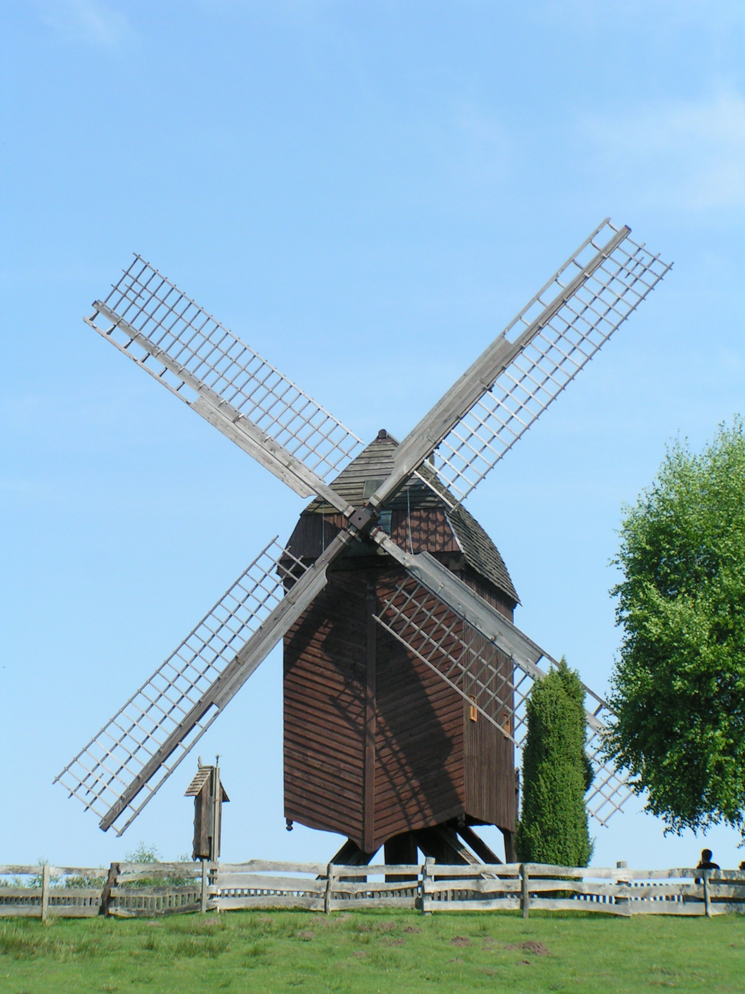 Deutsche Bockwindmühle "Viktoria" im Internationalen Mühlenmuseum Gifhorn